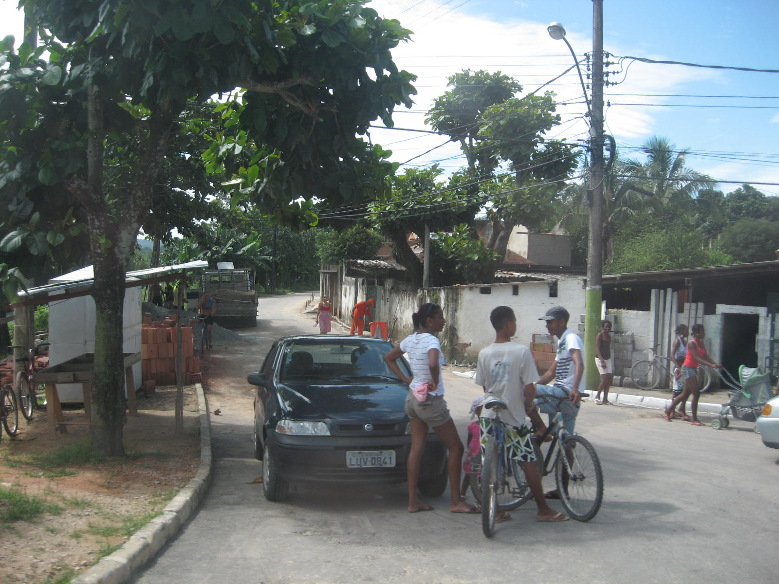 Santo Aleixo, segundo distrito de Magé, no estado do Rio de Janeiro, Brasil.